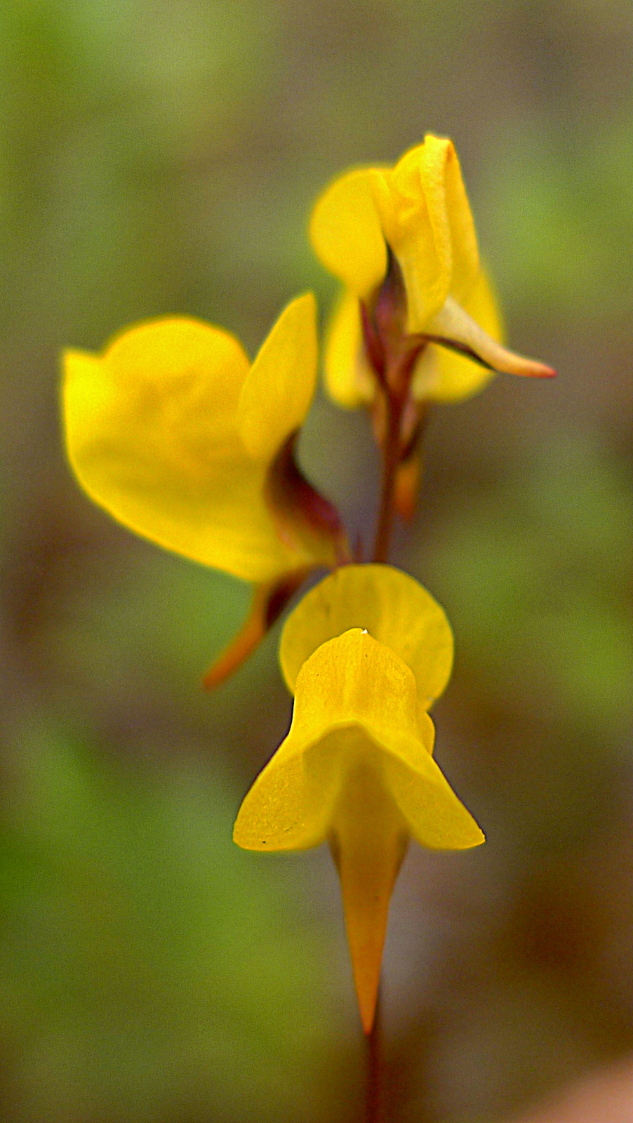 Utricularia juncea Vahl